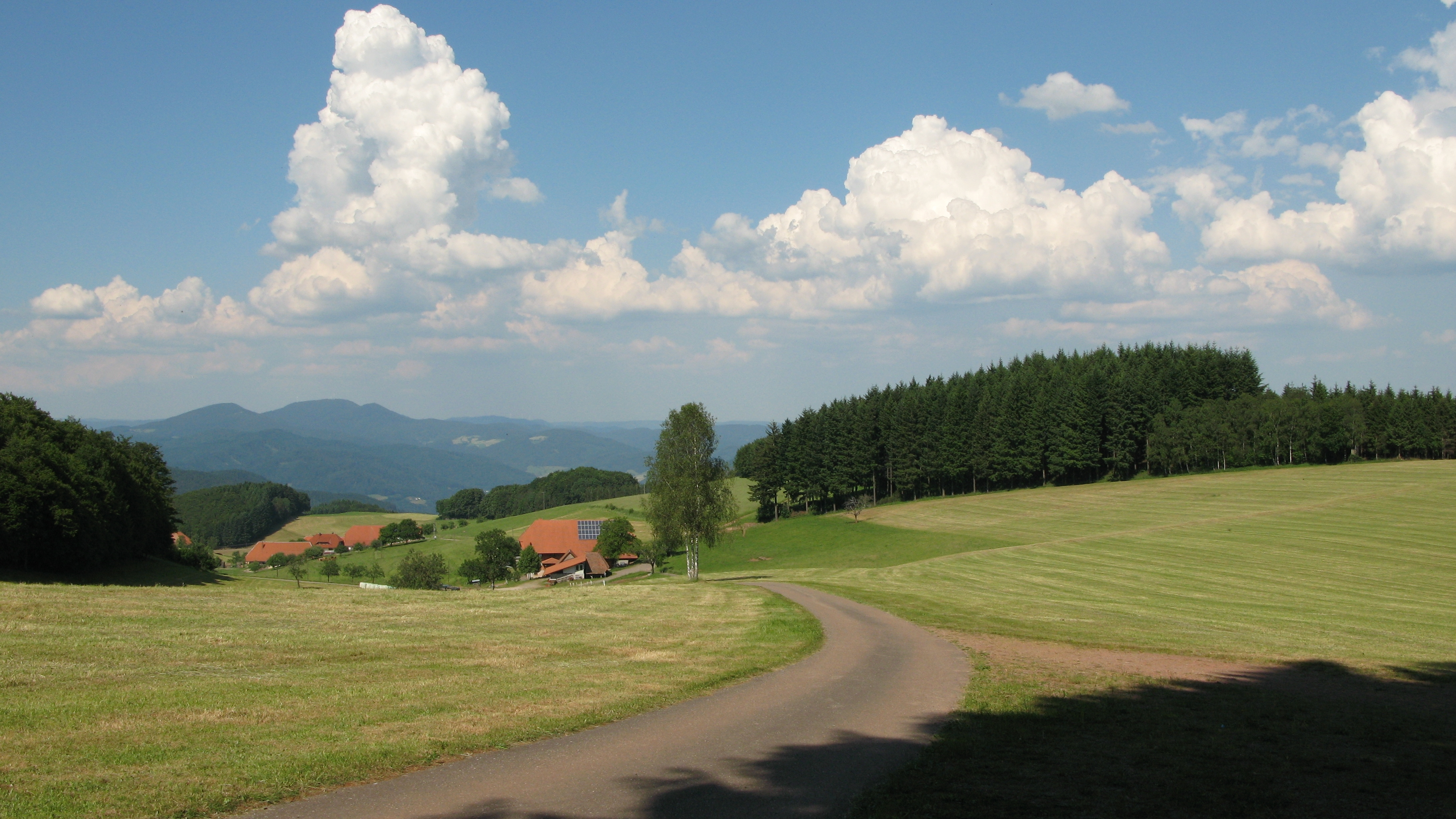 Blick von der Breitebene nordöstlich in Richtung Brandenkopf und Hofstetten auf dem Schwarzwald-Querweg Rottweil–Lahr und dem Zweitälersteig im mittleren Schwarzwald.